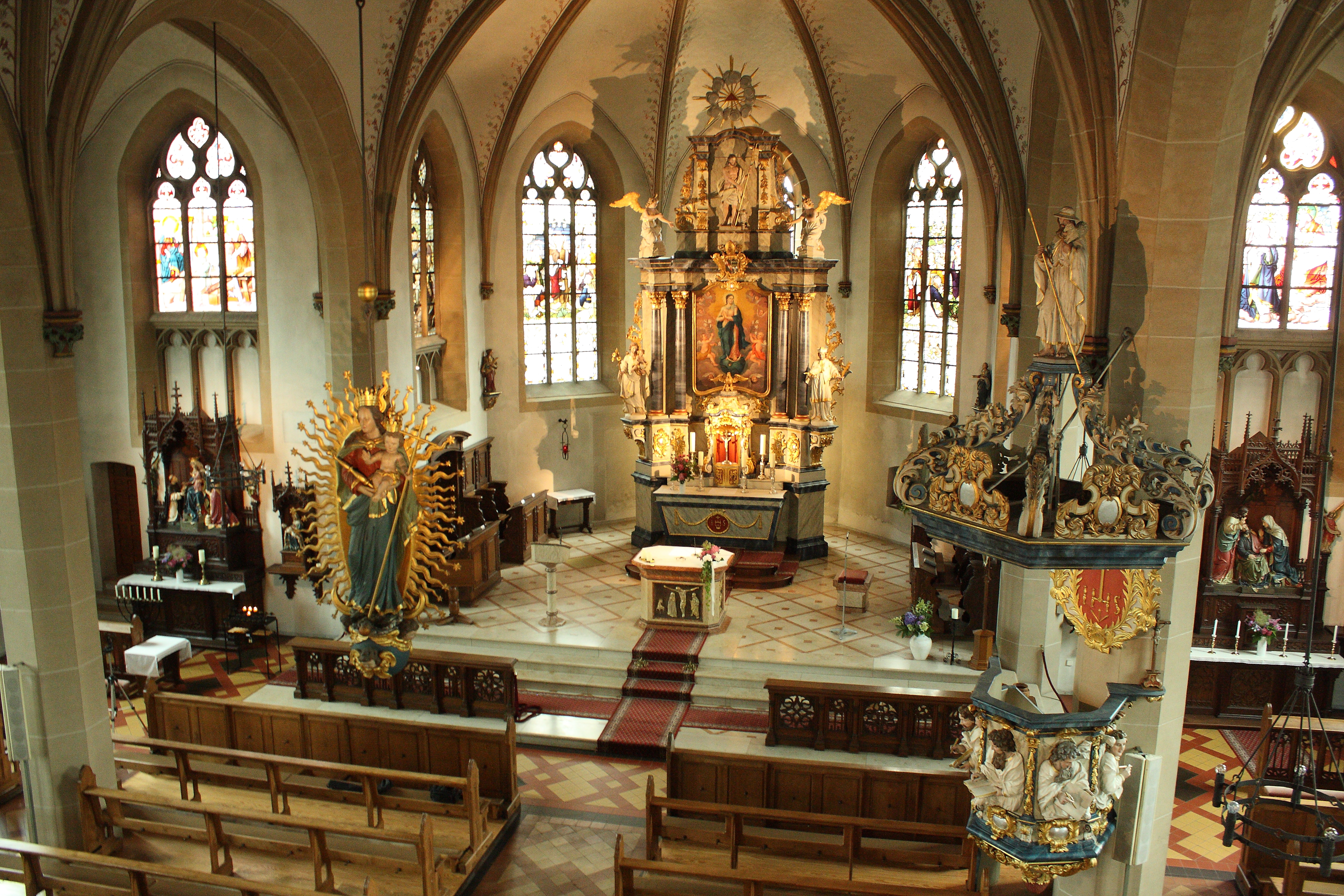 Innenansicht von St. Johannes der Täufer Greffen